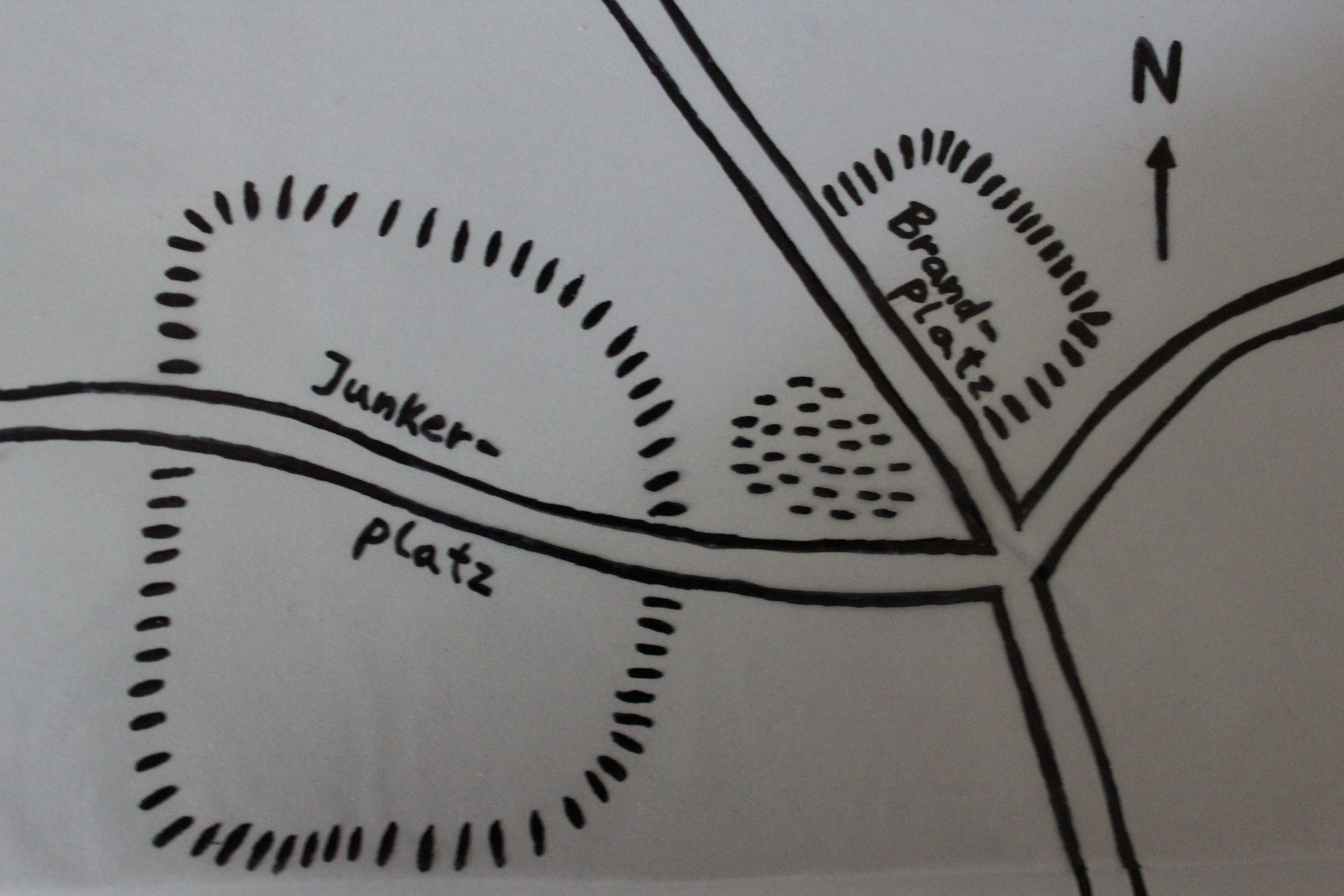 Grobe Positionsskizze zur Eddeboe